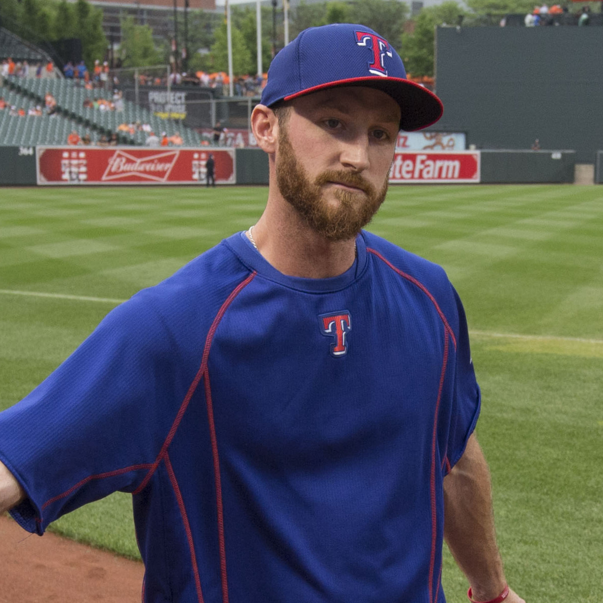 Spencer Patton